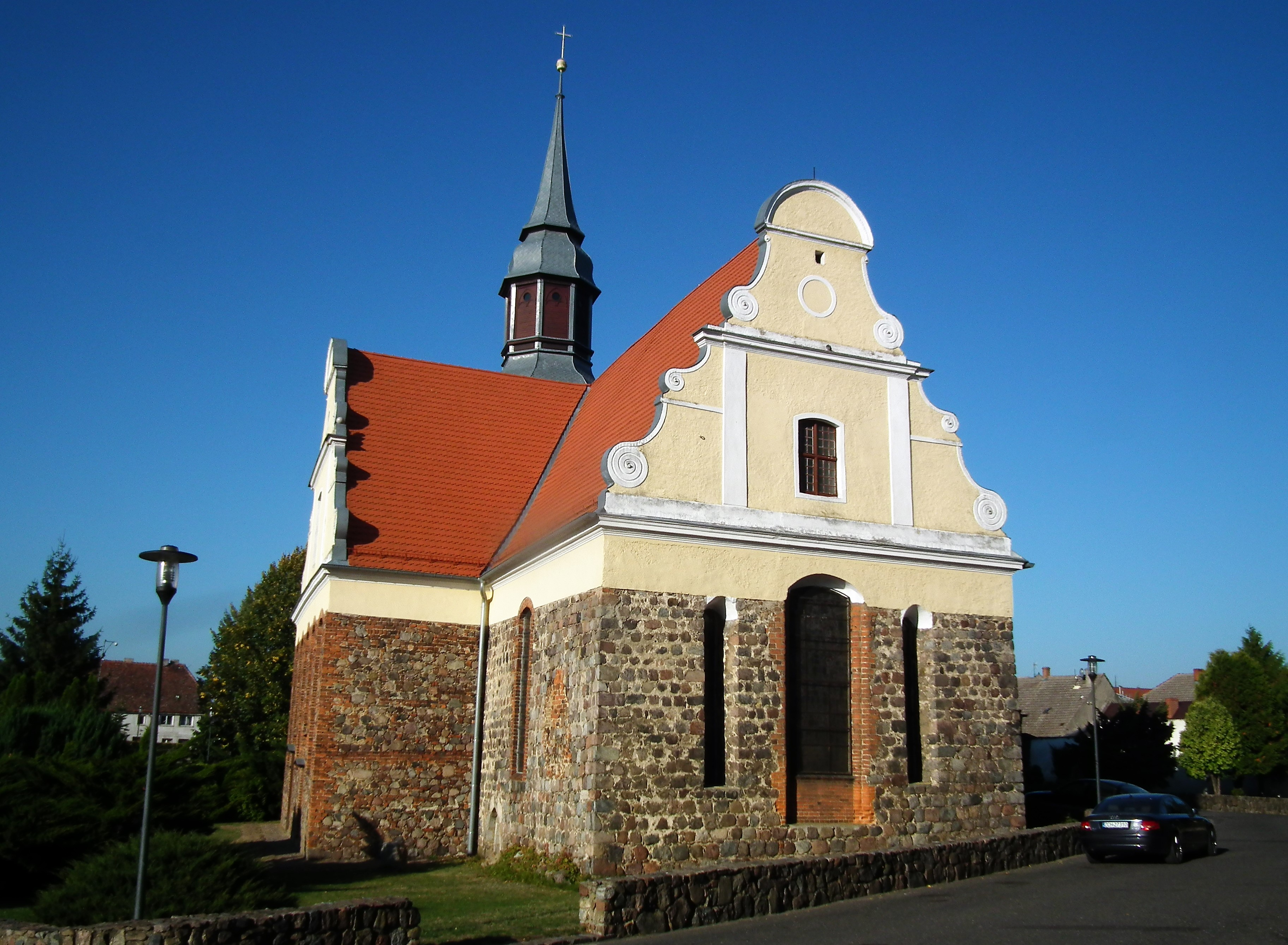 Kościół Narodzenia Najświętszej Maryi Panny w Pełczycach.